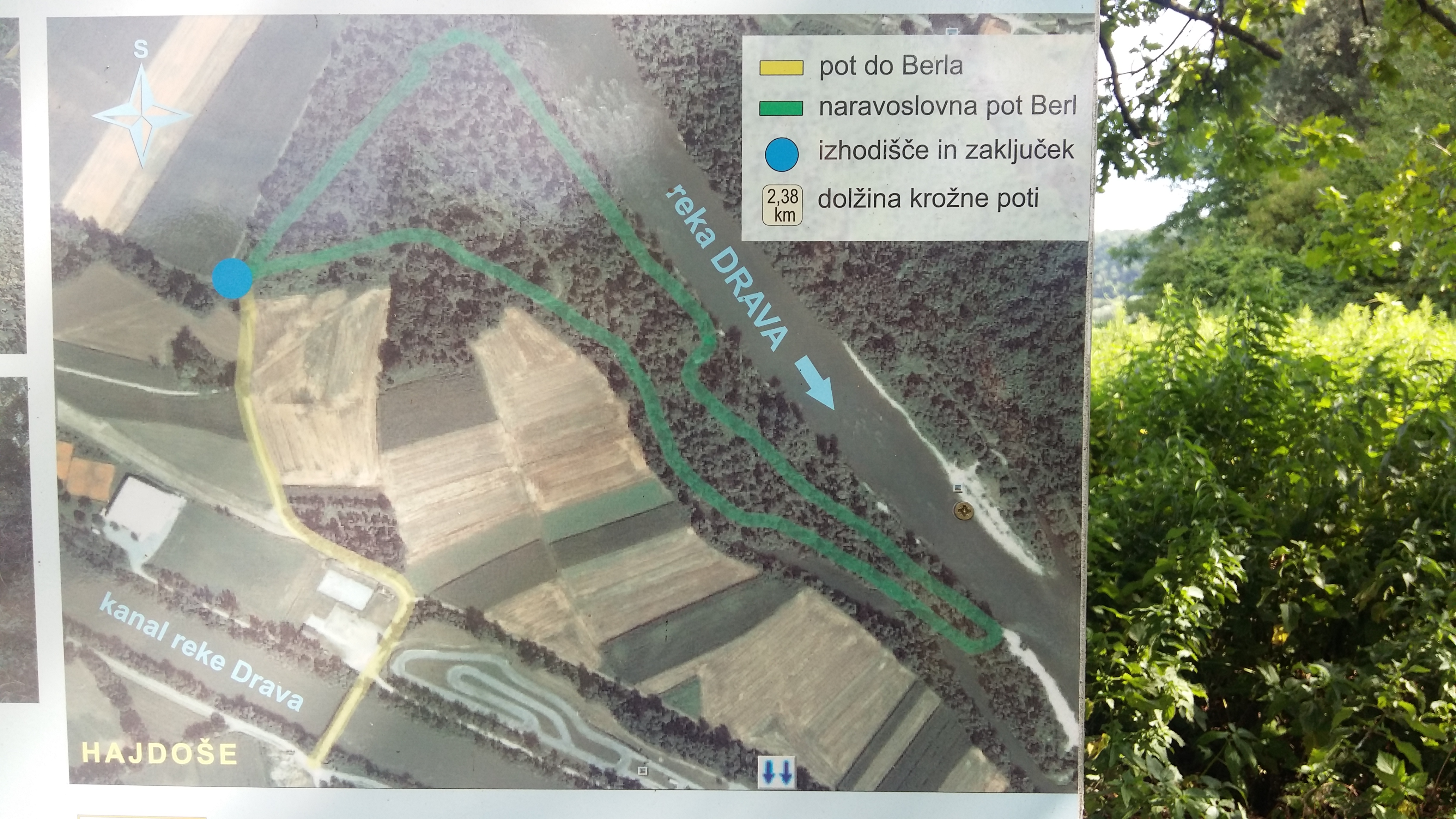 Načrt krožne poti